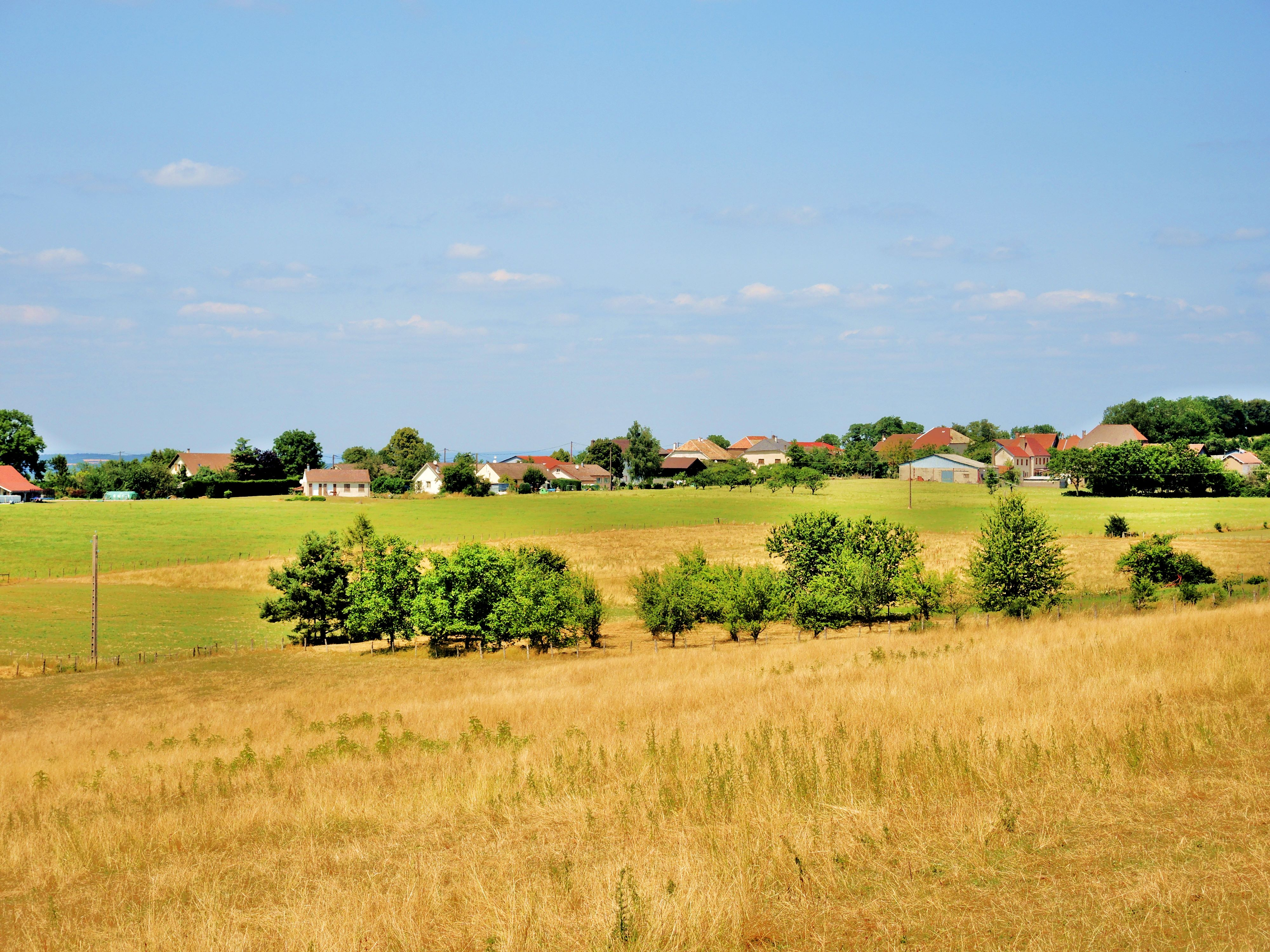 Panorama& sur le village de Bournois, depuis le chemin de la Baume.